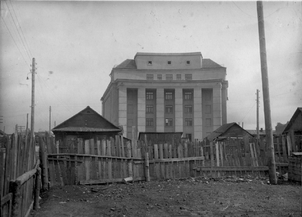 Беларуская (тарашкевіца): Менск (Miensk), Камароўка (Kamaroŭka): пляц Камароўскі (plac Kamaroŭski), цяпер пляц Якуба Коласа